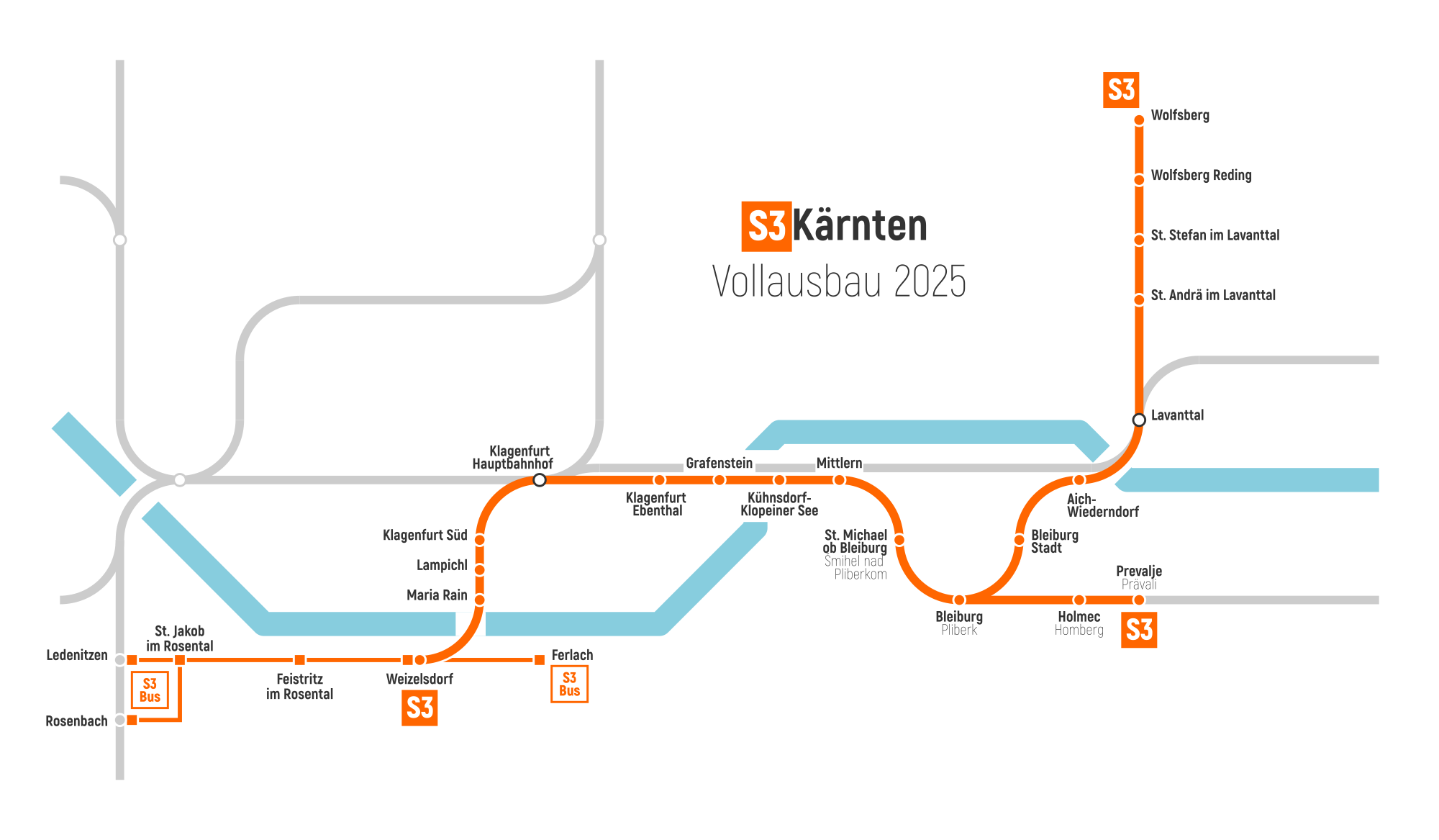 S Bahn Kärnten S3 2025